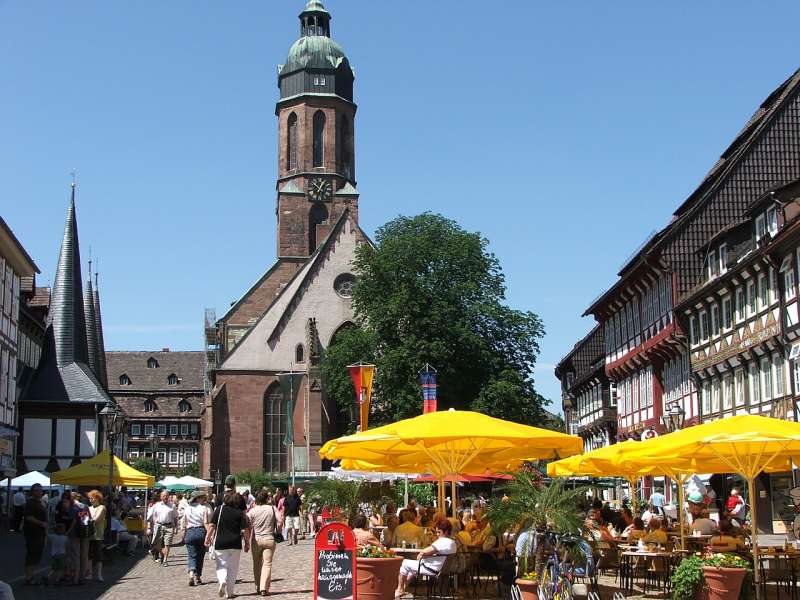 Marktplatz in Einbeck.